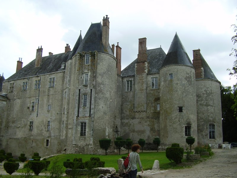 Chateau de Meung-sur-Loire.